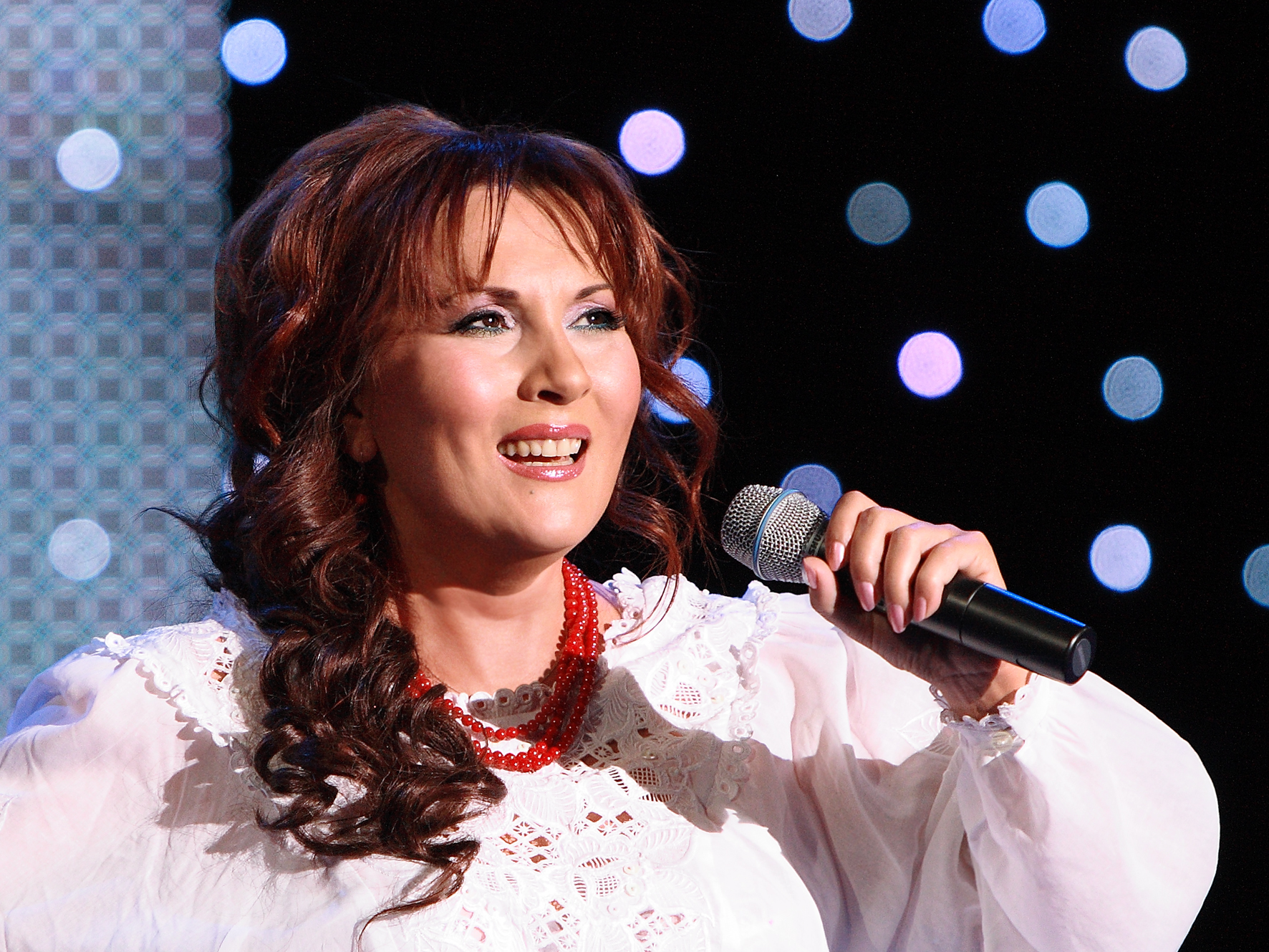 Степова Валентина Анатоліївна.